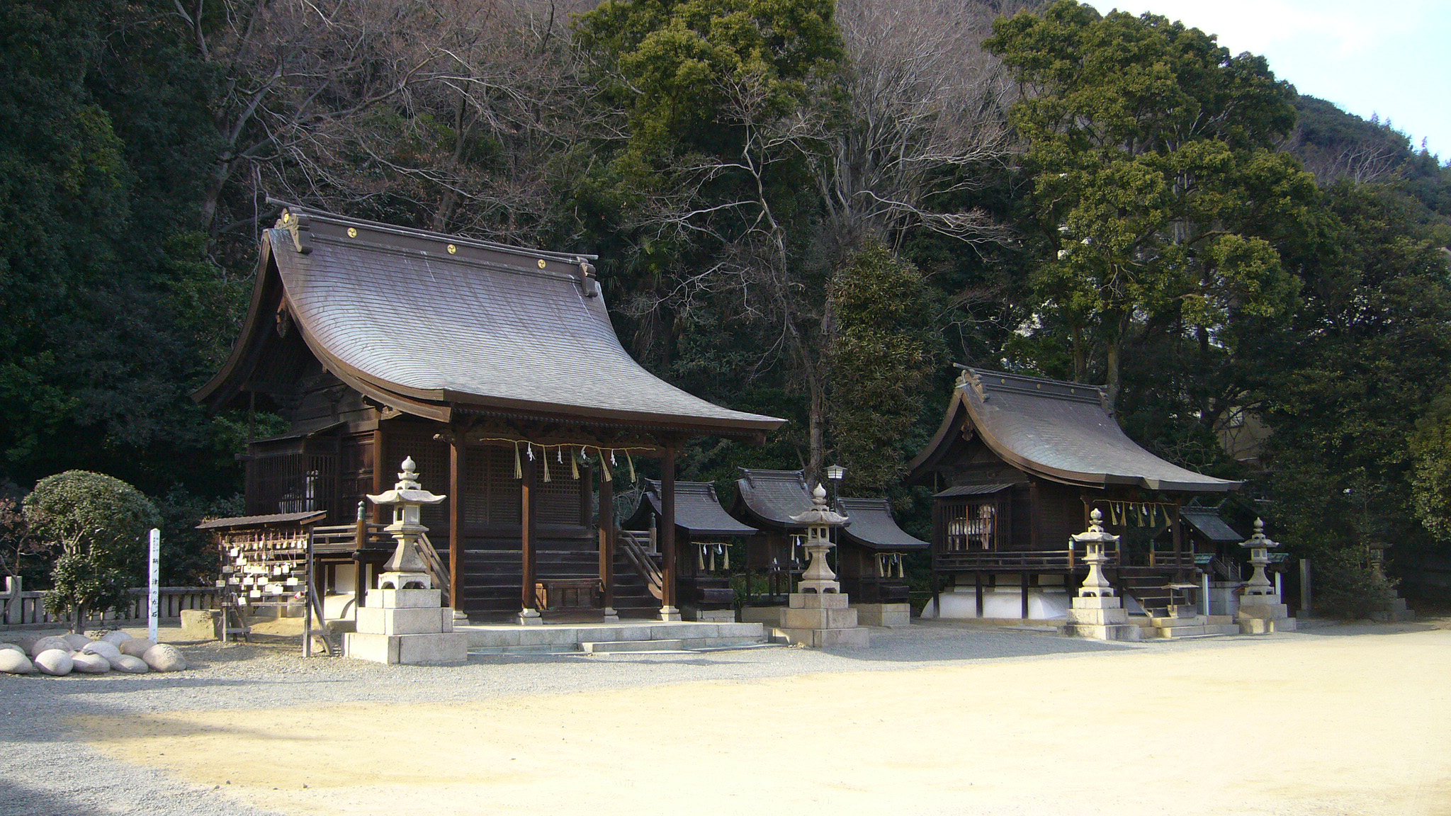 Nunakuma-jinja, Fukuyama, Hiroshima, Japan